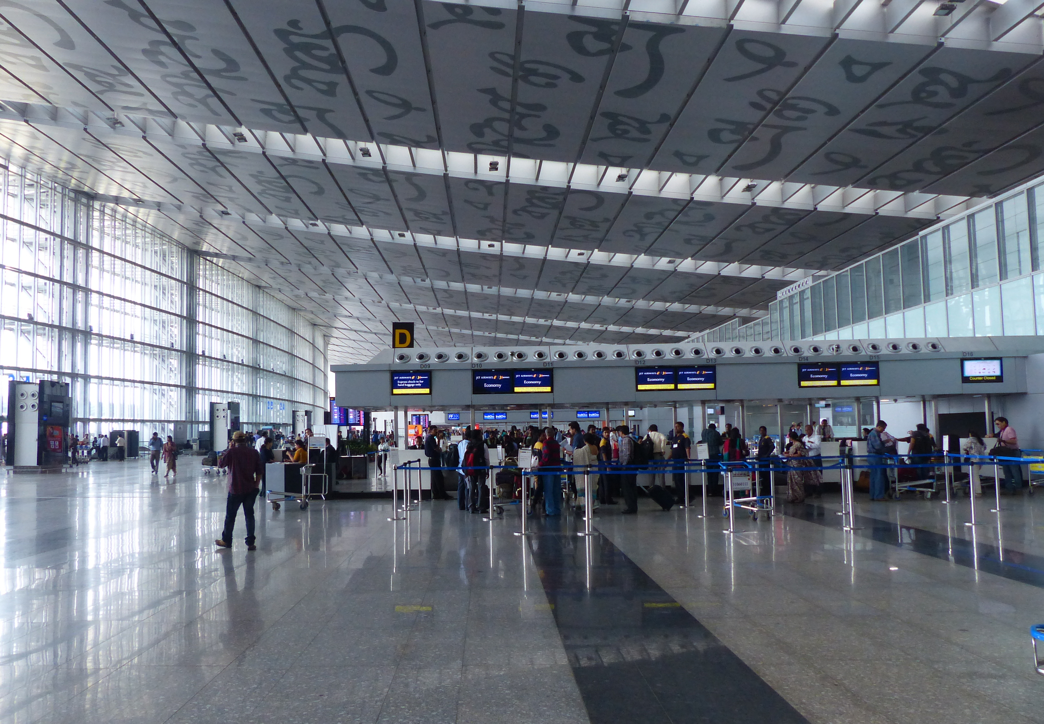 Kolkata Airport Terminal, India